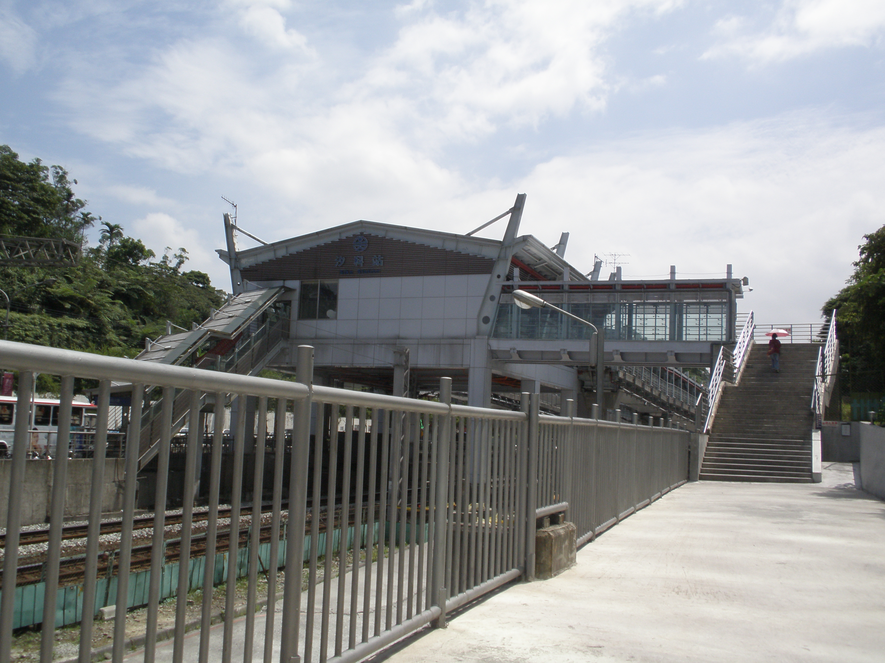 臺灣鐵路管理局汐科車站南站通往遠東世界中心的人行連絡道。